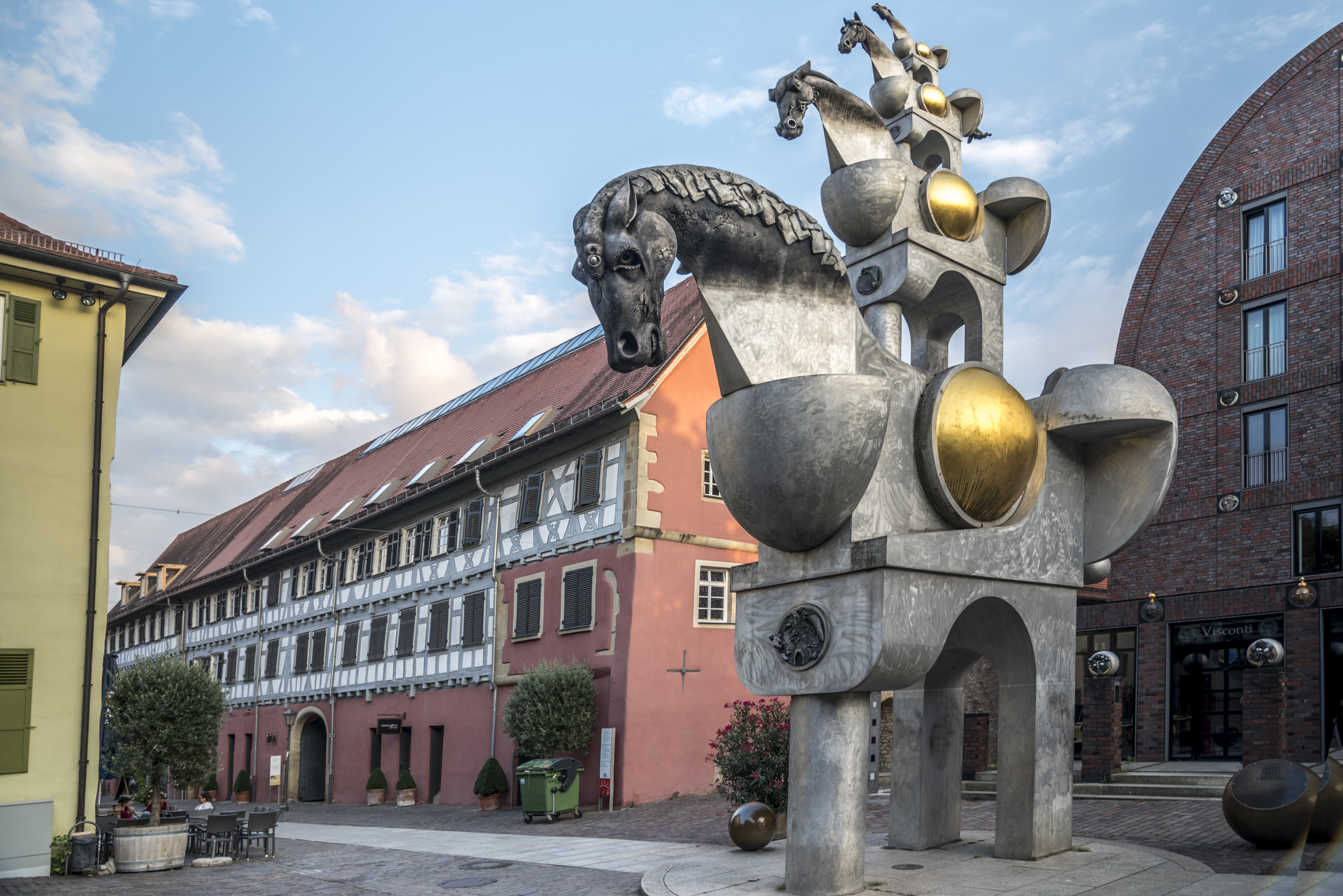 Das Bietigheimer Schloss, im Vordergrund der "Turm der gauen Pferde" und rechts daneben das Tonnenhaus.